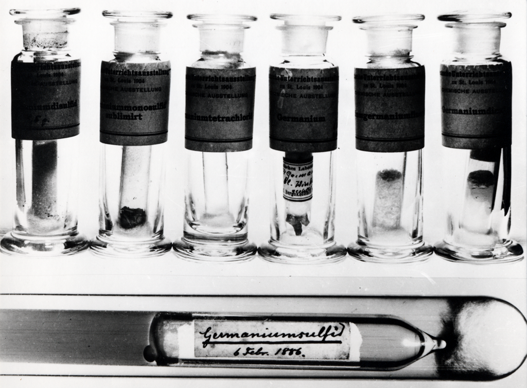 Originalpräparate des Elements Germanium von Clemens Winkler oben: Die zur Weltausstellung 1904 in St. Louis gezeigten Präparate unten: Germaniumsulfid vom 6. Februar 1886